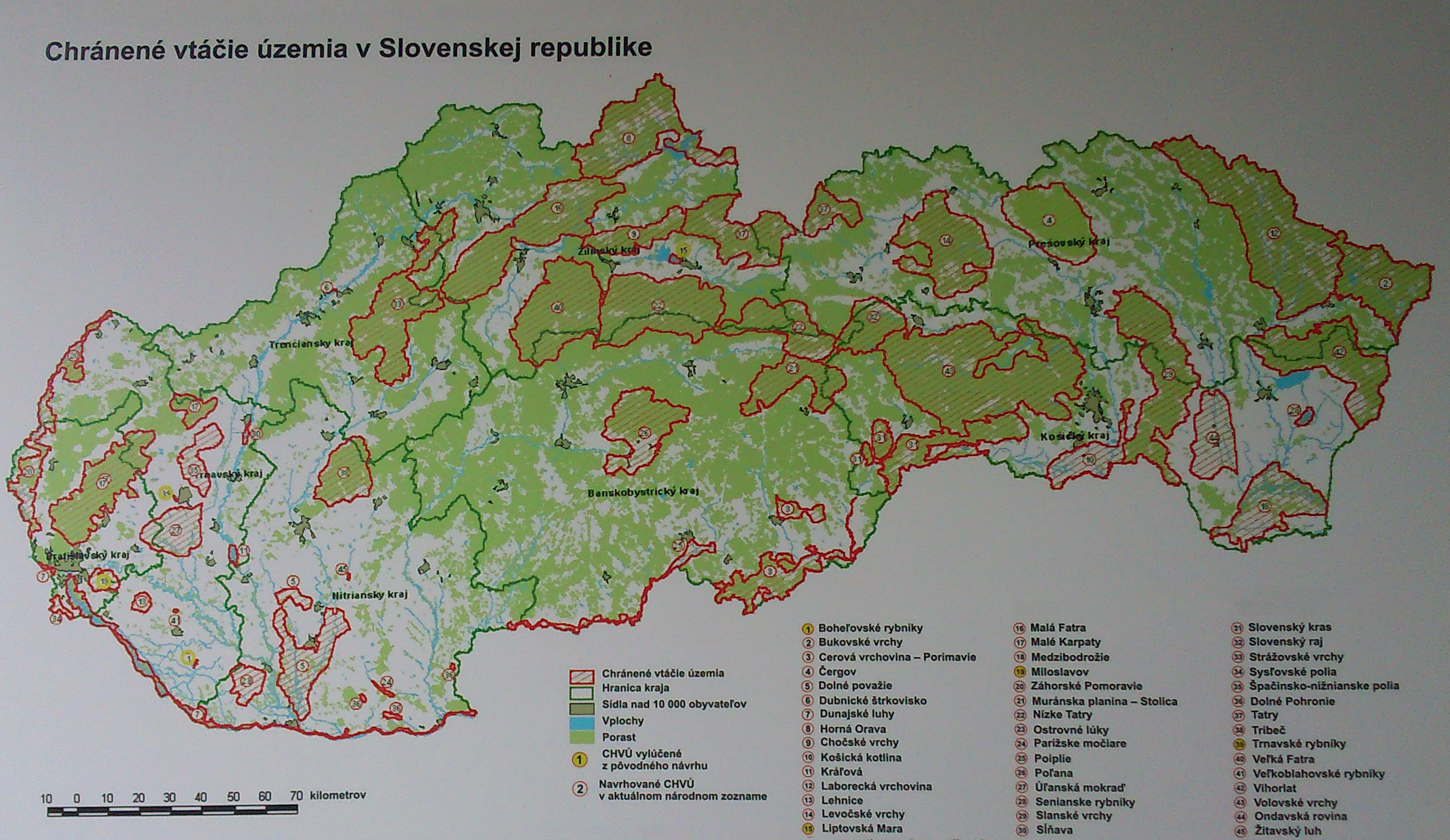 Mapa Chránených vtáčích území